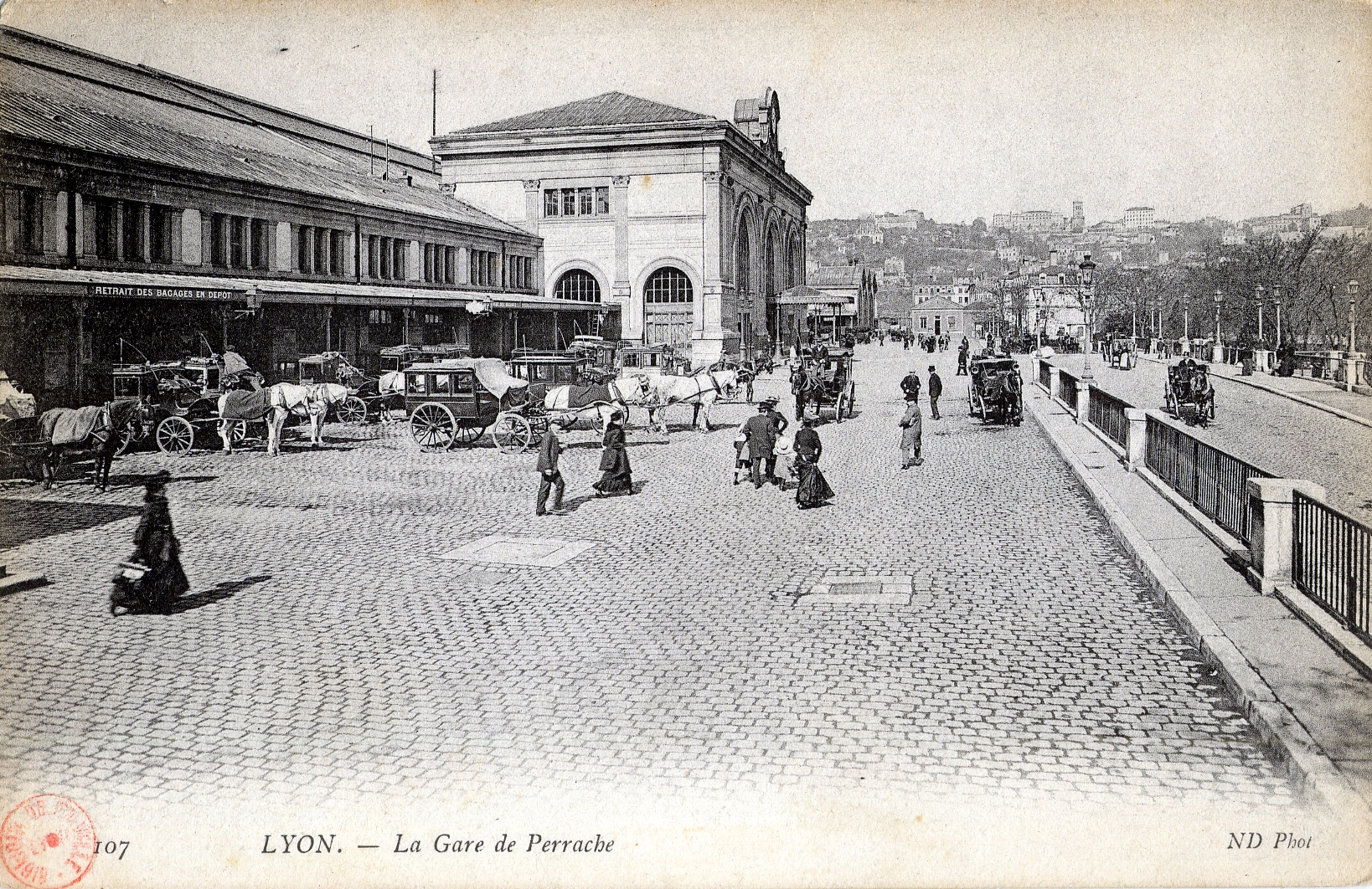 La Gare de Lyon-Perrache vers 1900